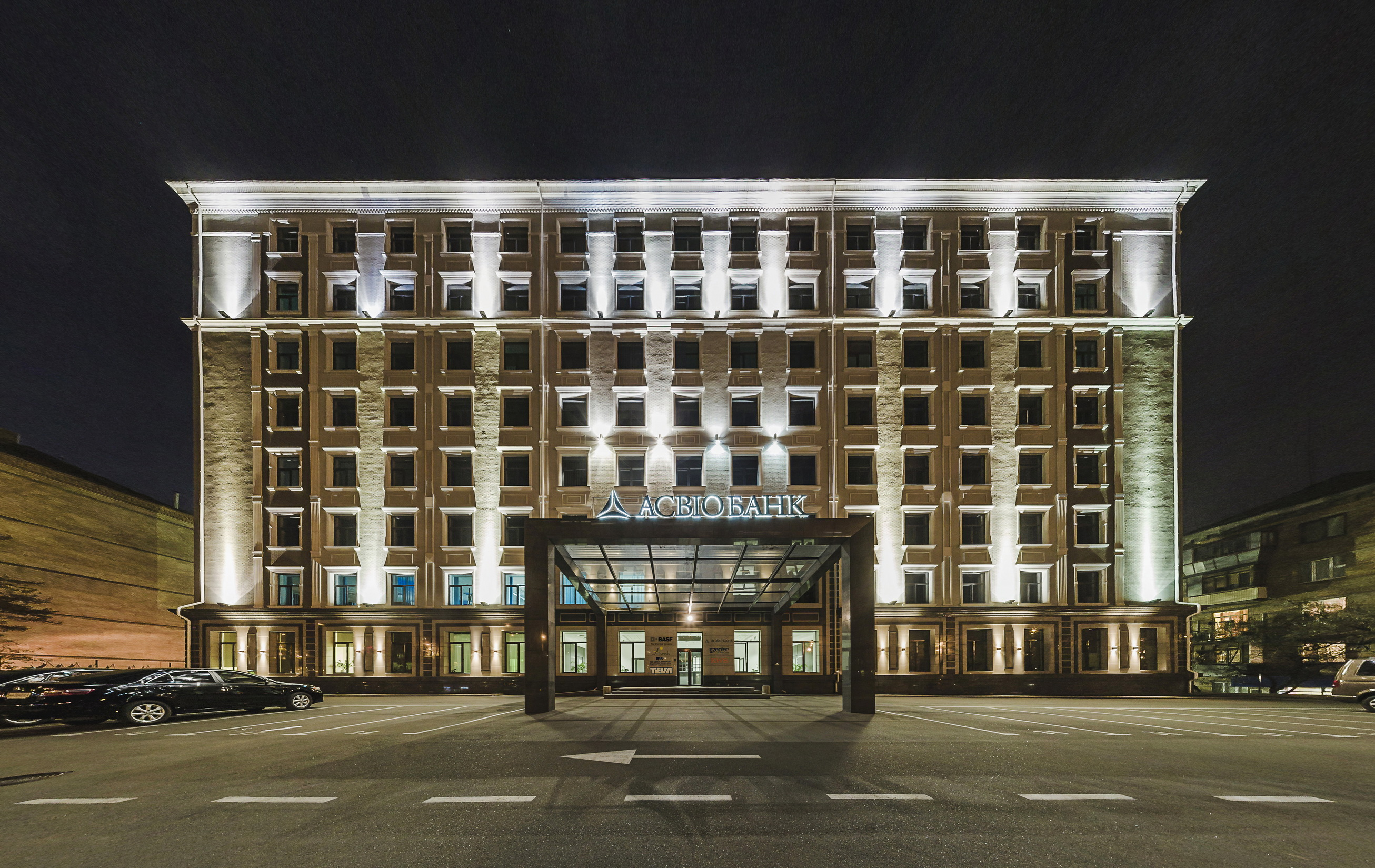 Головний офіс ПАТ "Асвіо Банк" у Києві